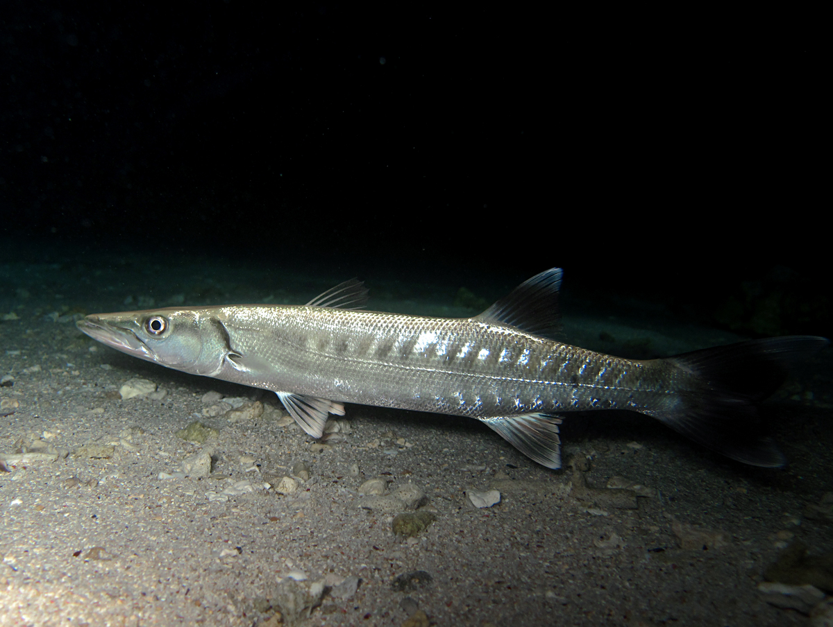 Un jeune barracuda (Sphyraena barracuda) de nuit à la Réunion.